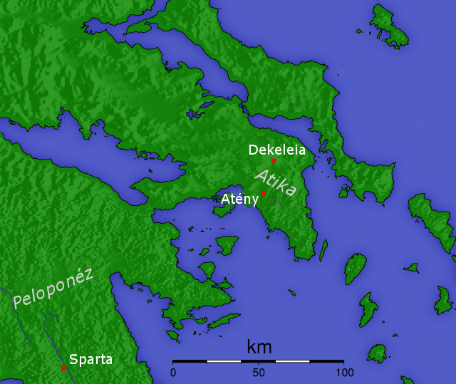 preklad sk::de:Image:Dekeleia.png Kategória:Obrázky máp